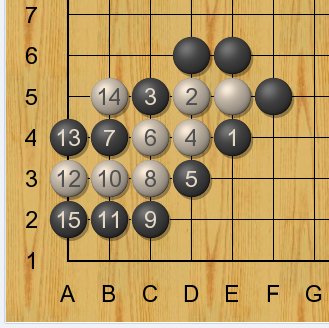 Ситё. После хода чёрных 1 белые пытаются убежать. Строя "лестницу" из камней, чёрные препятствуют белым и, по достижении края доски, забирают белые камни.